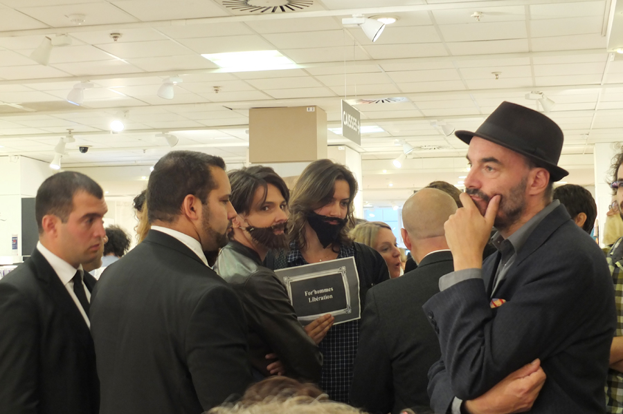 Les For'hommes de Libération. Barbues avec vigiles après action de La Barbe, au " Forum Citoyens, Citadins " BHV Marais - Libération - Bazar de l'Hôtel de Ville, rue de Rivoli, Paris, dimanche 25 09 2016 - photo AH. Force et muscles virils pour écarter le danger ? Hommes de sécurité pressant des femmes de partir après qu’elles ont surgi à une tribune d’orateurs mâles. Les militantes sont grimées par un morceau de fausse fourrure en guise de barbe postiche. Action du collectif féministe La Barbe ! « Les For’hommes de Libération », Forum Citoyens et Citadins organisé par Libération et le BHV, BHV Marais, Paris, dimanche 25 septembre 2016.